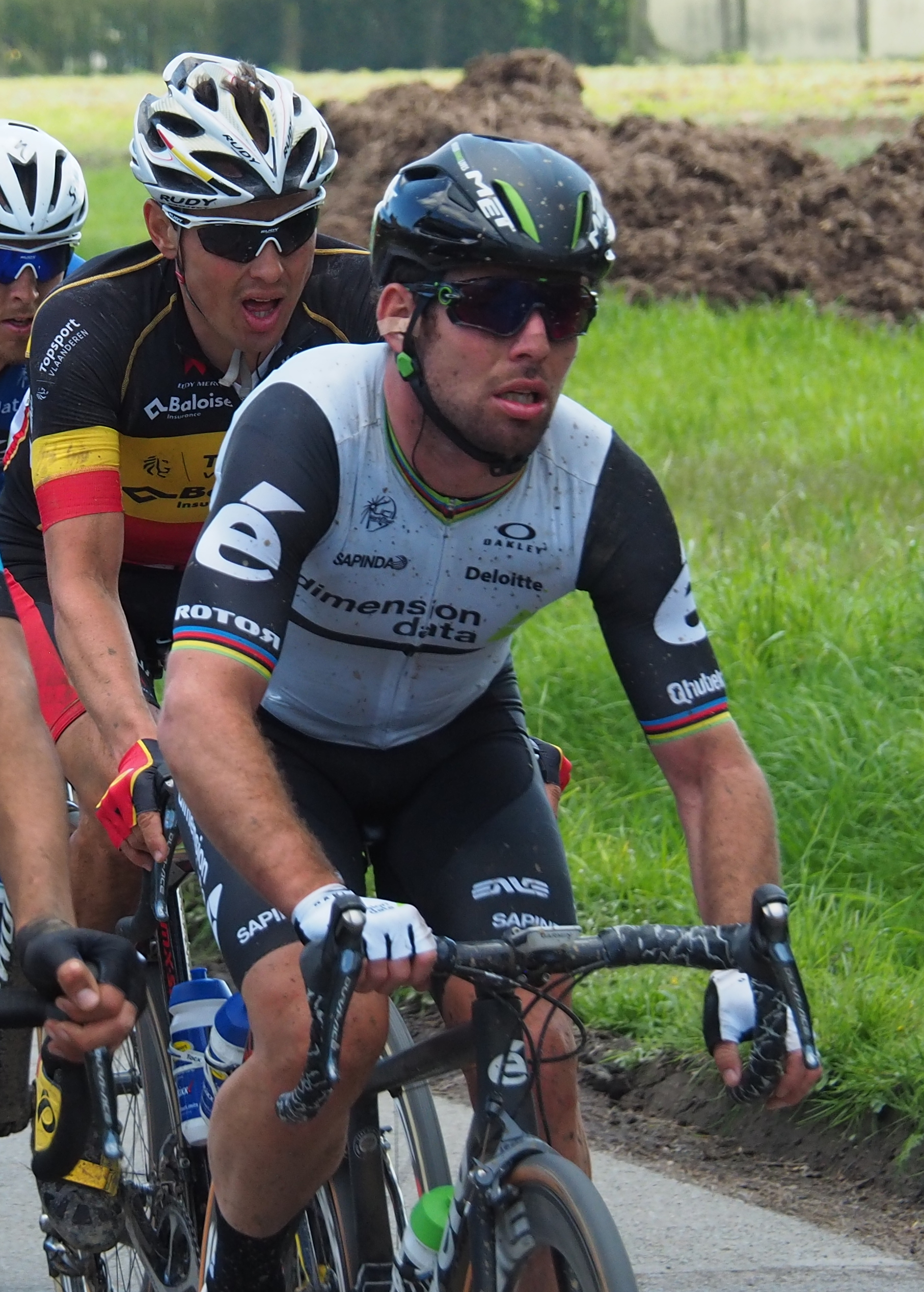 Paris-Roubaix 2016, à 8 km de l'arrivée. Au premier plan : à gauche Gianni Moscon, à droite Mark Cavendish Au second rang : à gauche, probablement Niklas Arndt (à confirmer), à droite Preben Van Hecke